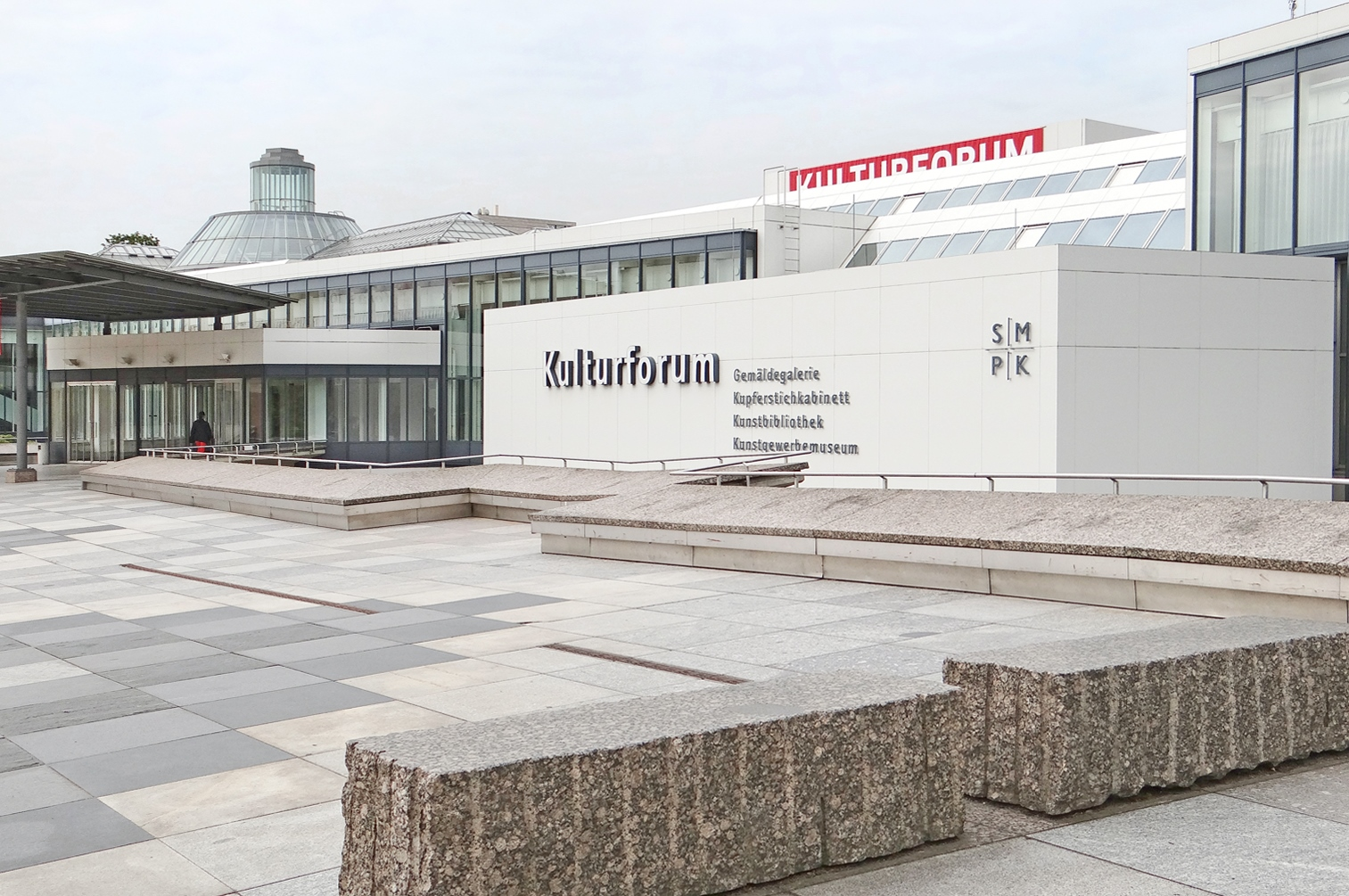 Le parvis d'entrée de la Gemäldegalerie sur le Kulturforum à Berlin Le bâtiment destiné à la galerie de peintures (musée national) a été conçu par les architectes Christoph Sattler, Heinz Hilmer, Thomas Albrecht. Le nouveau musée, situé Matthäikirchplatz 8, a été inauguré en 1998. Il fait partie d'un important contexte culturel appelé : Kulturforum sur lequel se trouvent également le musée des arts décoratifs (Kunstgewerbemuseum) fermé en 2013 pour rénovation, le cabinet d'arts graphiques et la bibliothèque des arts. Ces bâtiments communiquent entre eux. A proximité du Kulturforum, s'élèvent la Philharmonie (architecte Hans Scharoun) et la bibliothèque nationale, construites à l'époque de Berlin ouest. L'architecture extérieure de la Gemäldegalerie est relativement banale, seules les couleurs des différents matériaux de revêtement utilisés agrémentent et rythment la façade. L'entrée du musée se fait par une salle hexagonale pourvue d'une coupole intéressante éclairée par des carreaux de verre, cette salle mène à un grand hall central. Les salles d'exposition se répartissent autour de ce hall dont le plafond est soutenu par deux rangées de colonnes de section carrée. Une œuvre appelée "5- 7 - 9" de l'artiste conceptuel américain Walter de Maria (1935-2013) décore le centre de cet espace immense, présenté dans le guide du musée comme un lieu de rencontres et d'échanges, mais qui semble bien peu convivial (voir photo). Le bâtiment a l'avantage d'être très bien éclairé en lumière naturelle, ce qui est favorable à la mise en valeur des collections et facilite leur photographie par les visiteurs. Article de Wikipedia